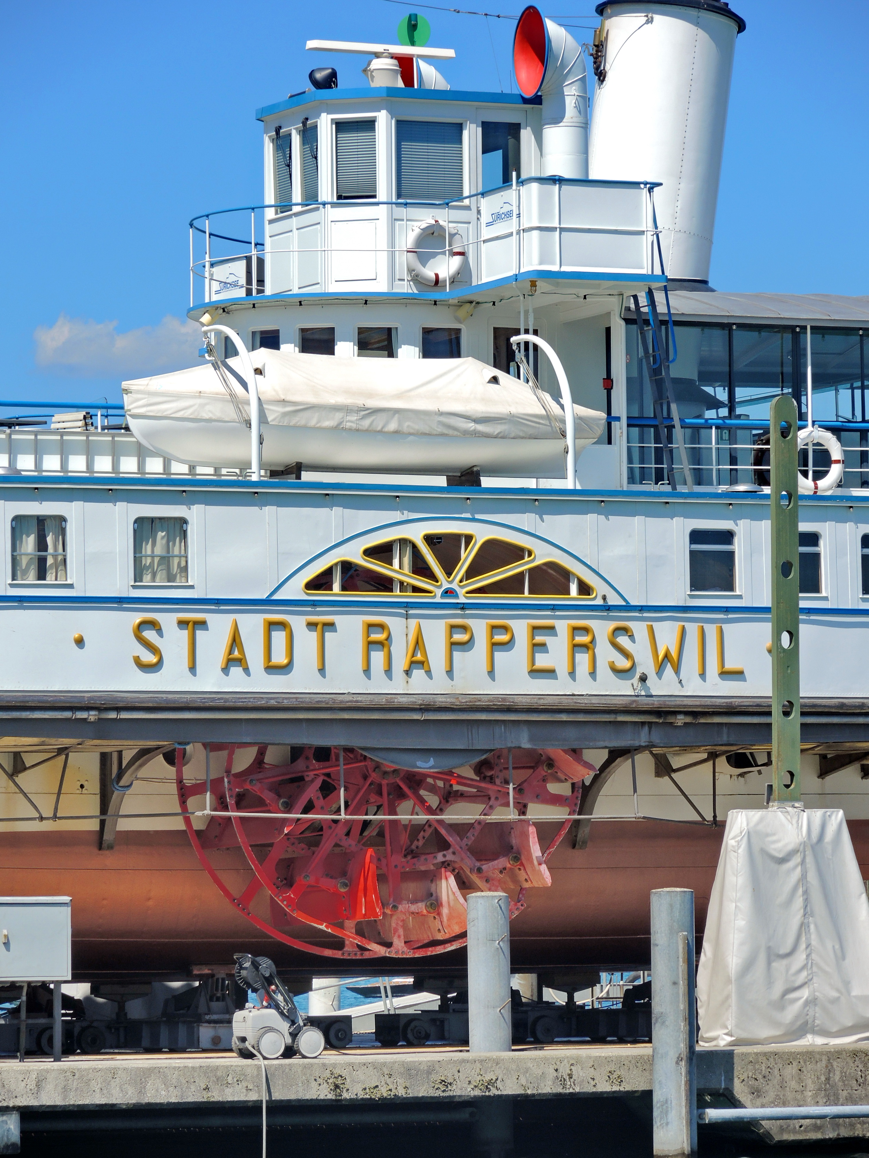 Stadt Rapperswil after the incident of 17 July 2015 at the Zürichsee-Schiffahrtsgesellschaft (ZSG) docks in Zürich-Wollishofen (Switzerland)